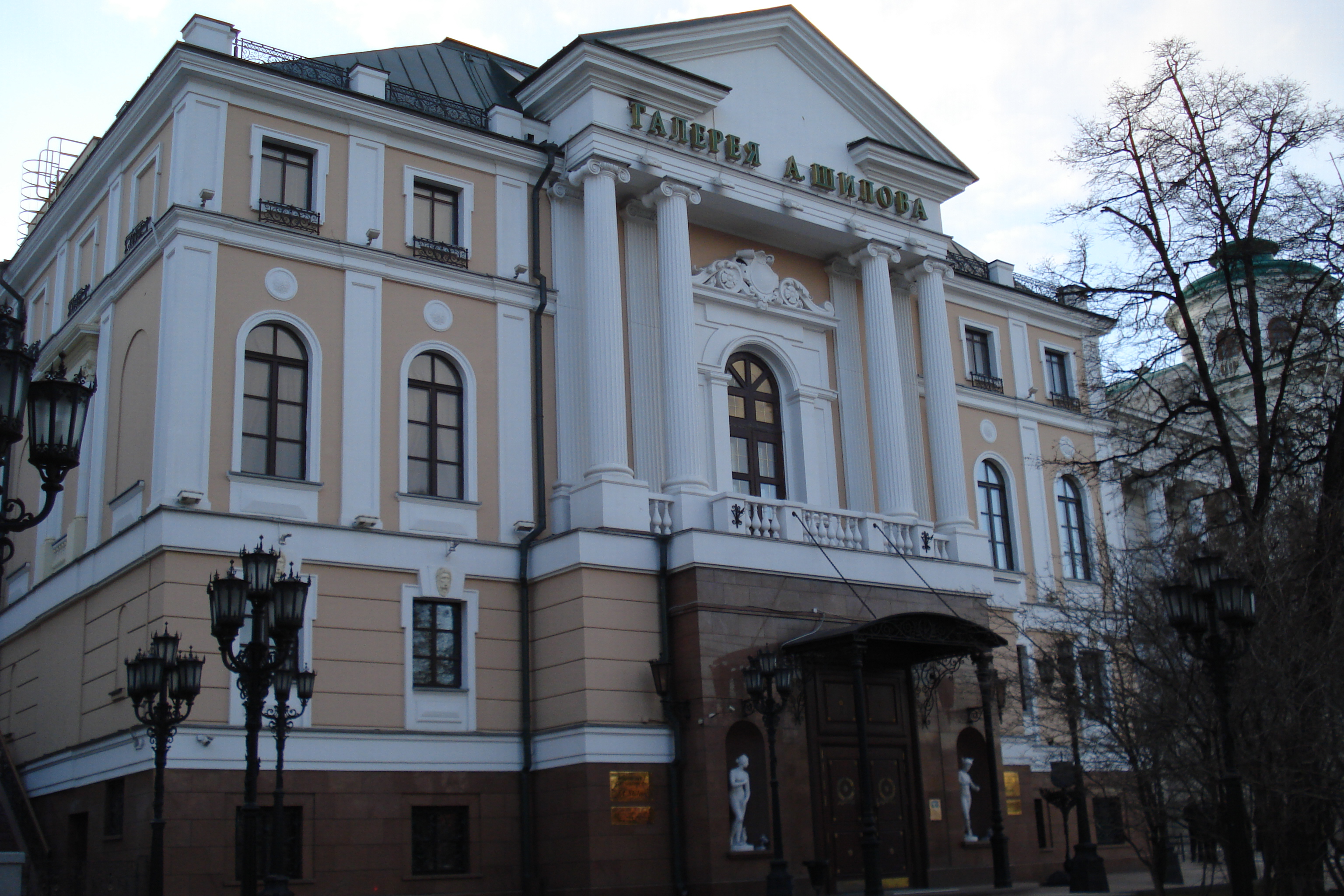 Moscow State Art Gallery of People's Artist of the USSR Alexander Shilov. Московская государственная картинная галерея народного художника СССР А. Шилова. Москва, ул. Знаменка, д. 5. Shilov's Gallery founded in 1997.